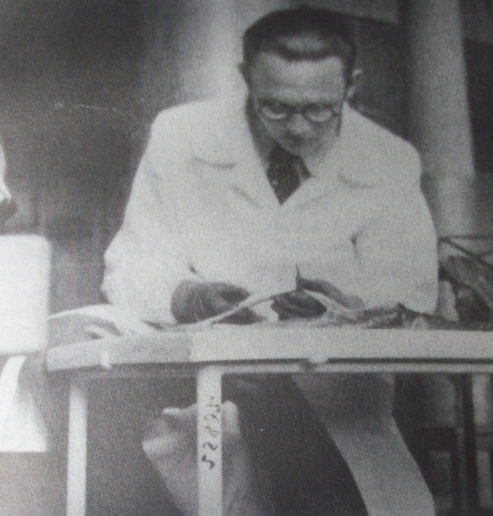 Ritratto fotografico di Simone Teich Alasia.